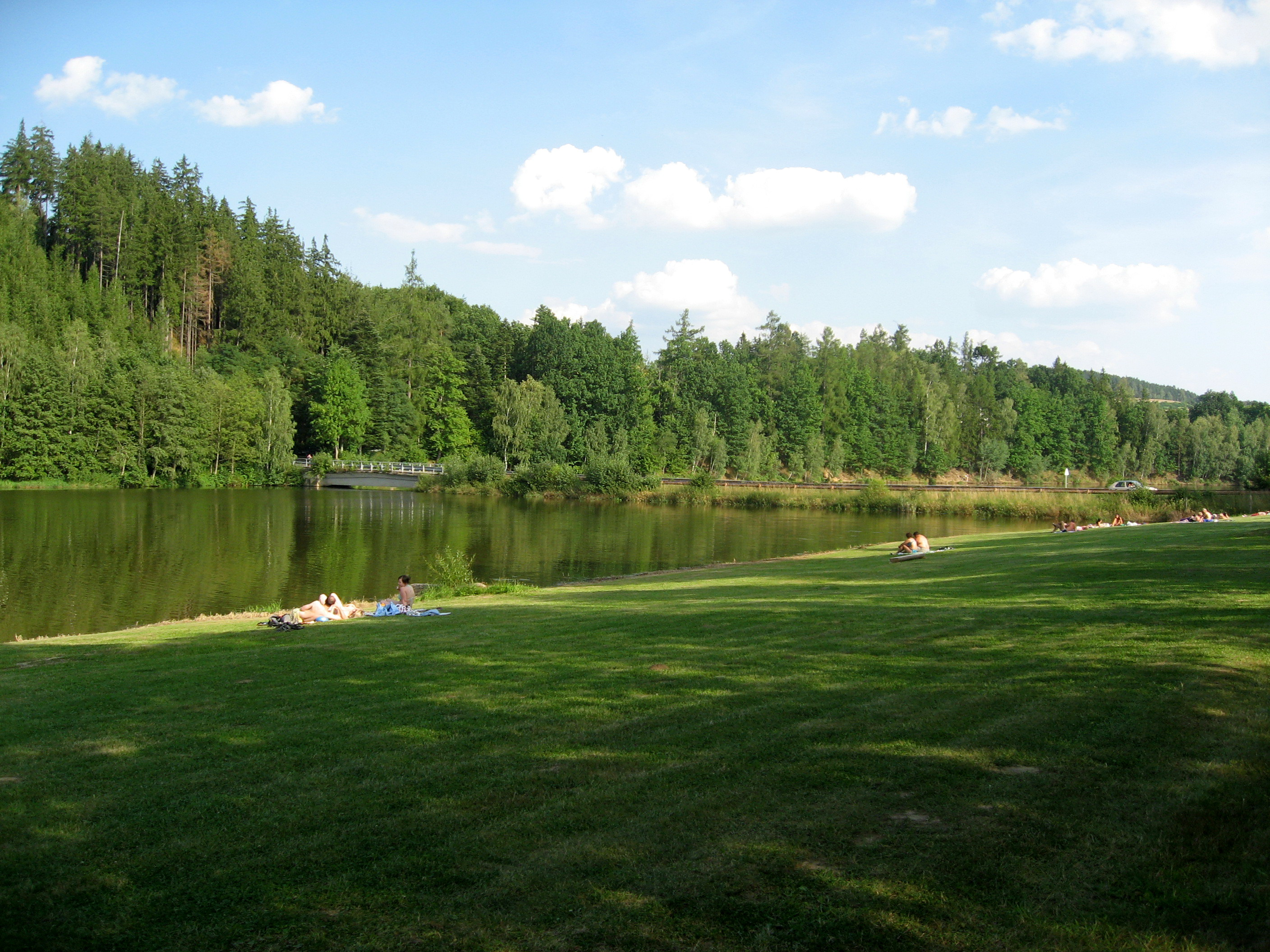 Vodní nádrž Želiv